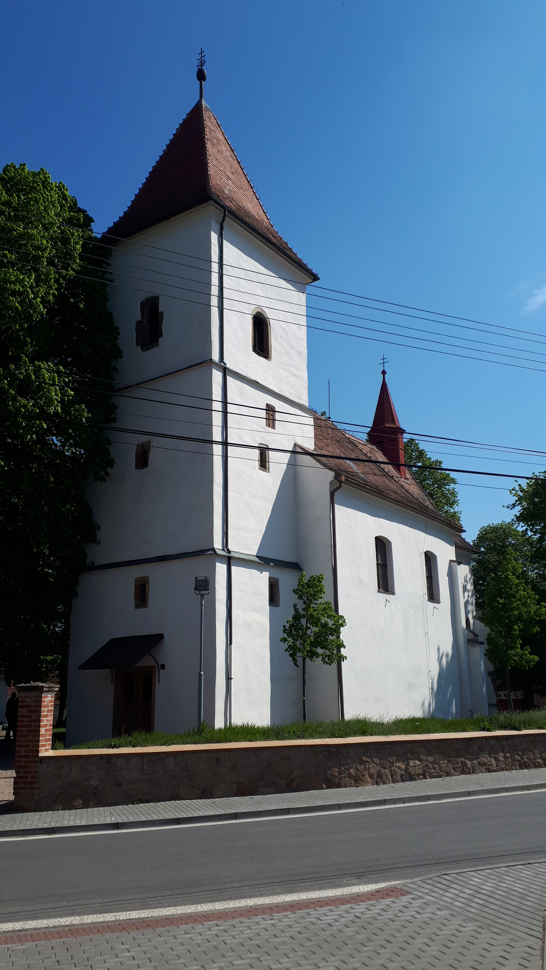 Drásov